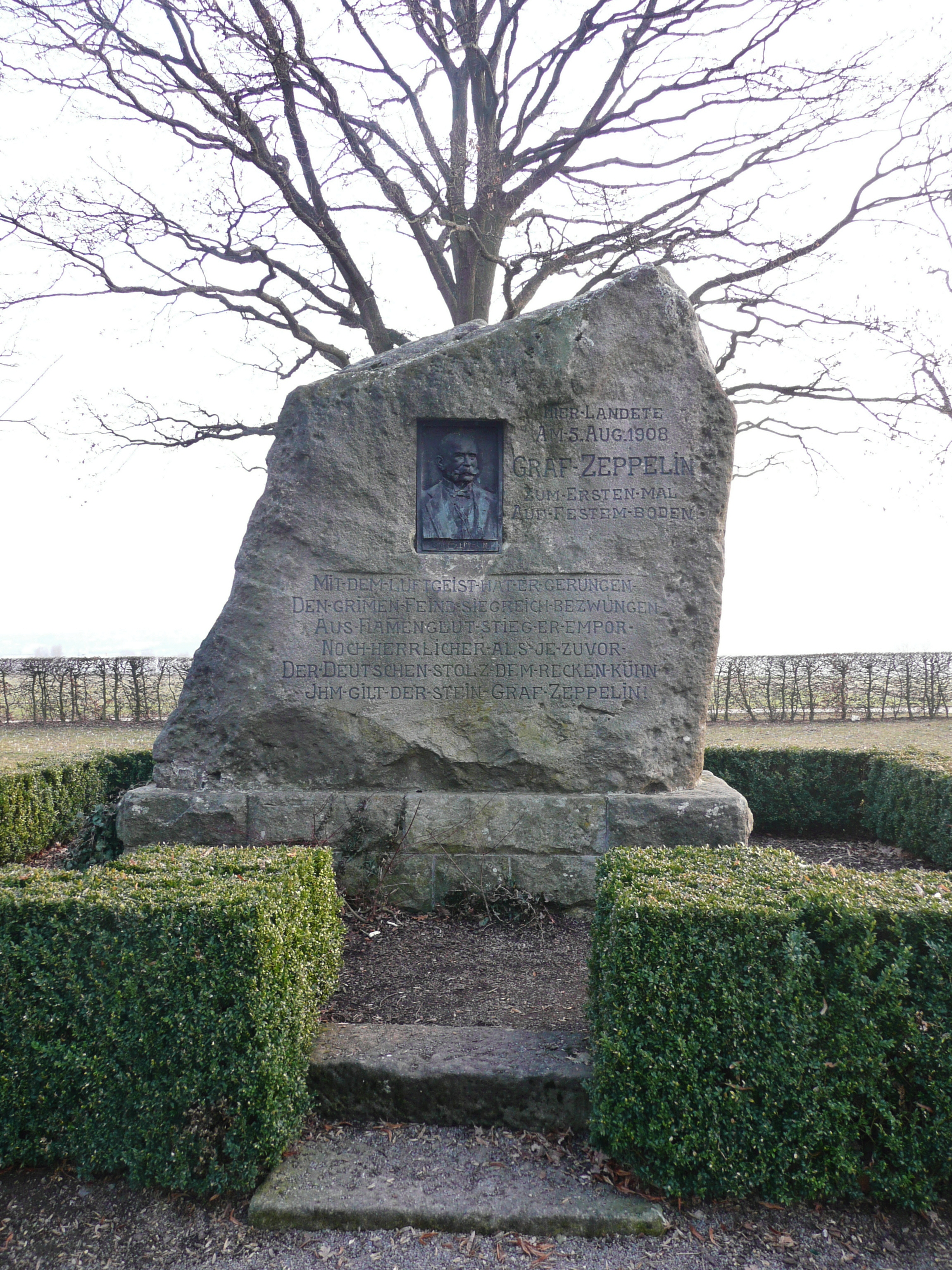 Graf Zeppelin Denkmal Leinfelden-Echterdingen. Inschrift: "Hier landete am 15. Aug. 1908 Graf Zeppelin zum ersten Mal auf festem Boden: Mit dem Luftgeist hat er gerungen - Den grimmen Feind siegreich bezwungen - Aus Flammenglut stieg er empor - noch herrlicher als je zuvor - der Deutschen Stolz - dem Recken kühn - Ihm gilt der Stein Graf Zeppelin"